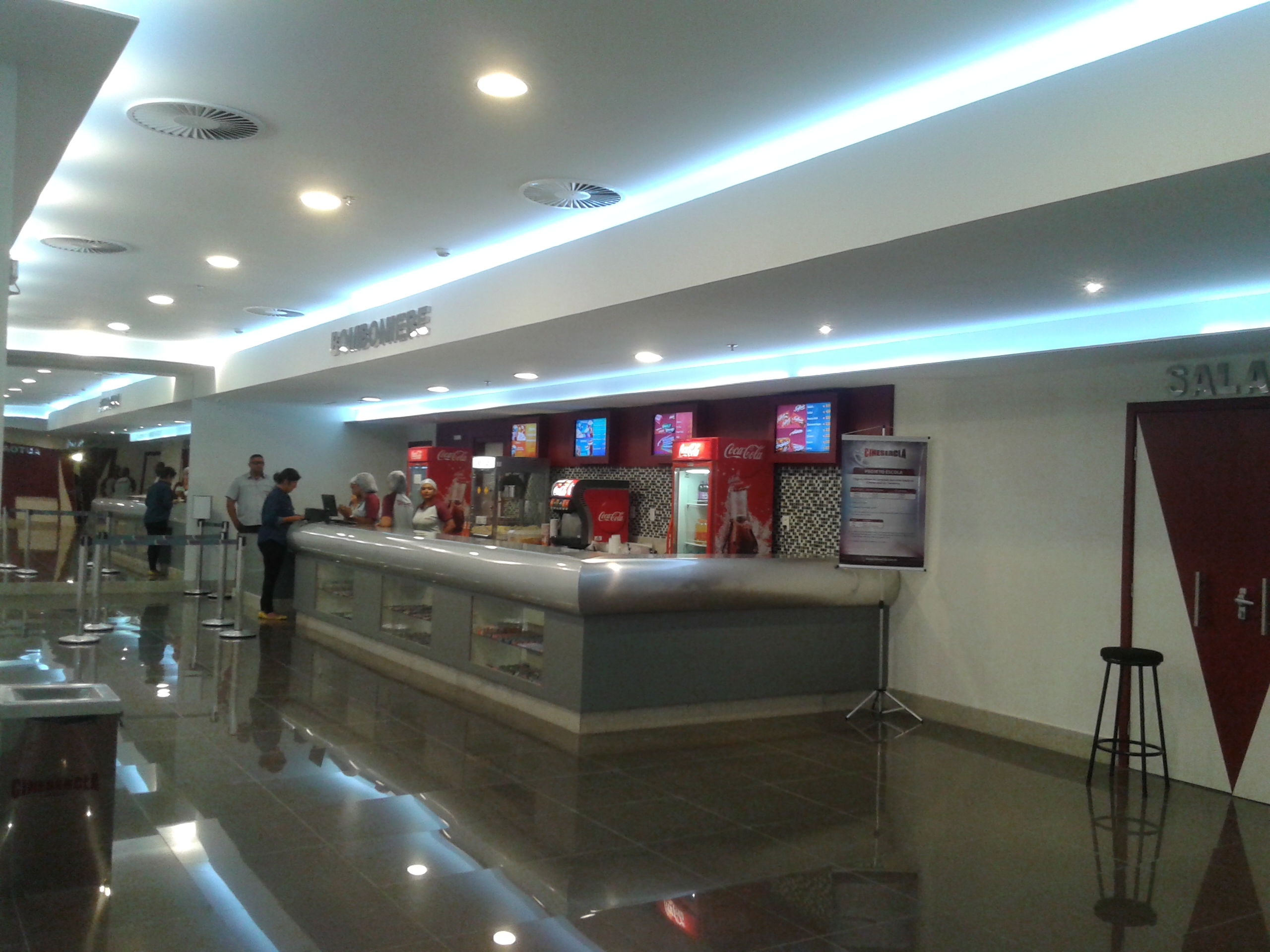 Bomboniére do Cinesercla do Shopping Cajazeiras em Salvador